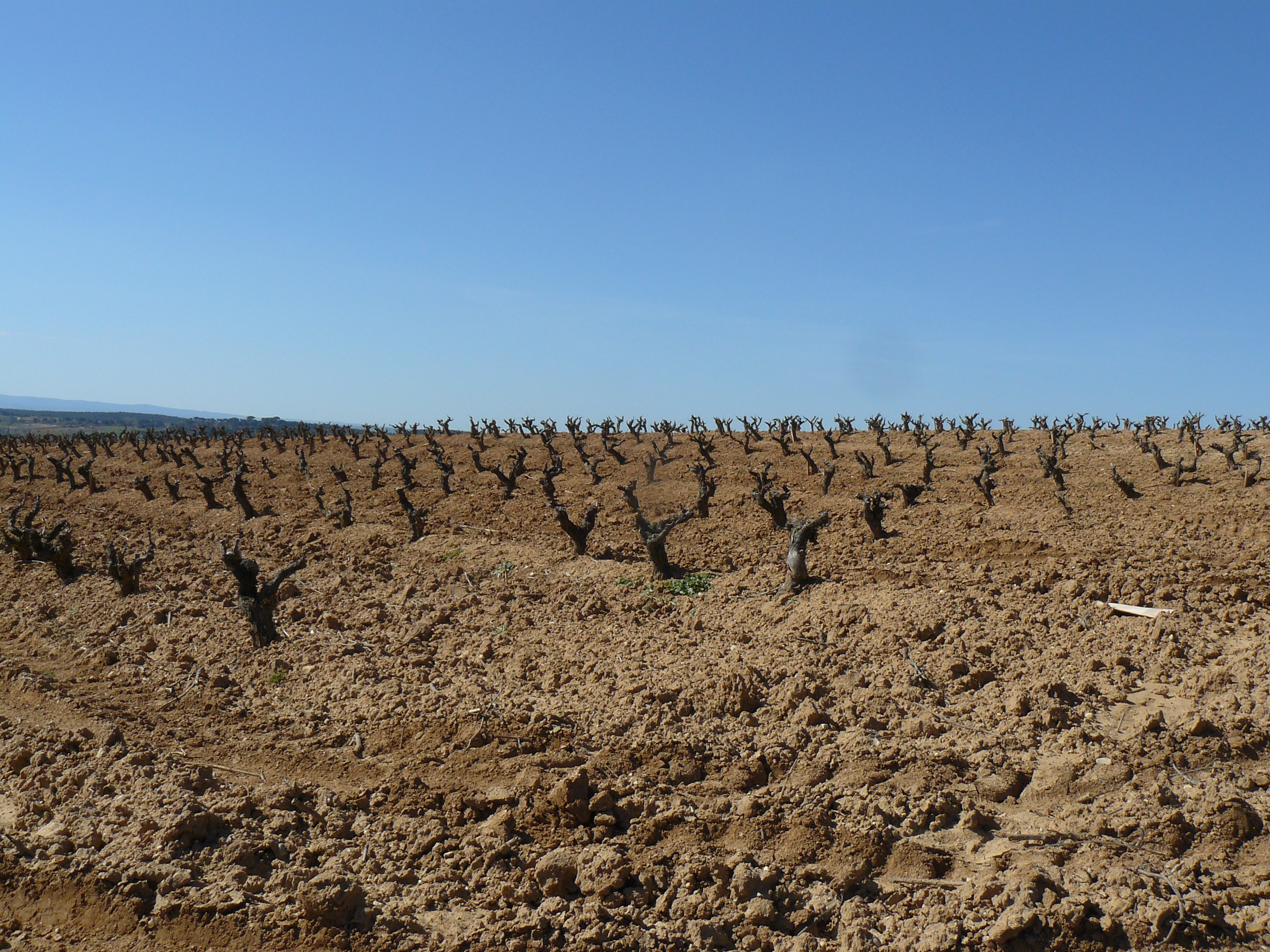 Gumiel del Mercado, Burgos.